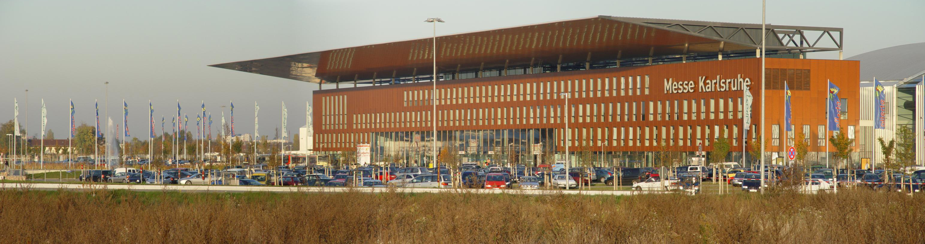 Fotografiert von Martin Dürrschnabel Messe Karlsruhe